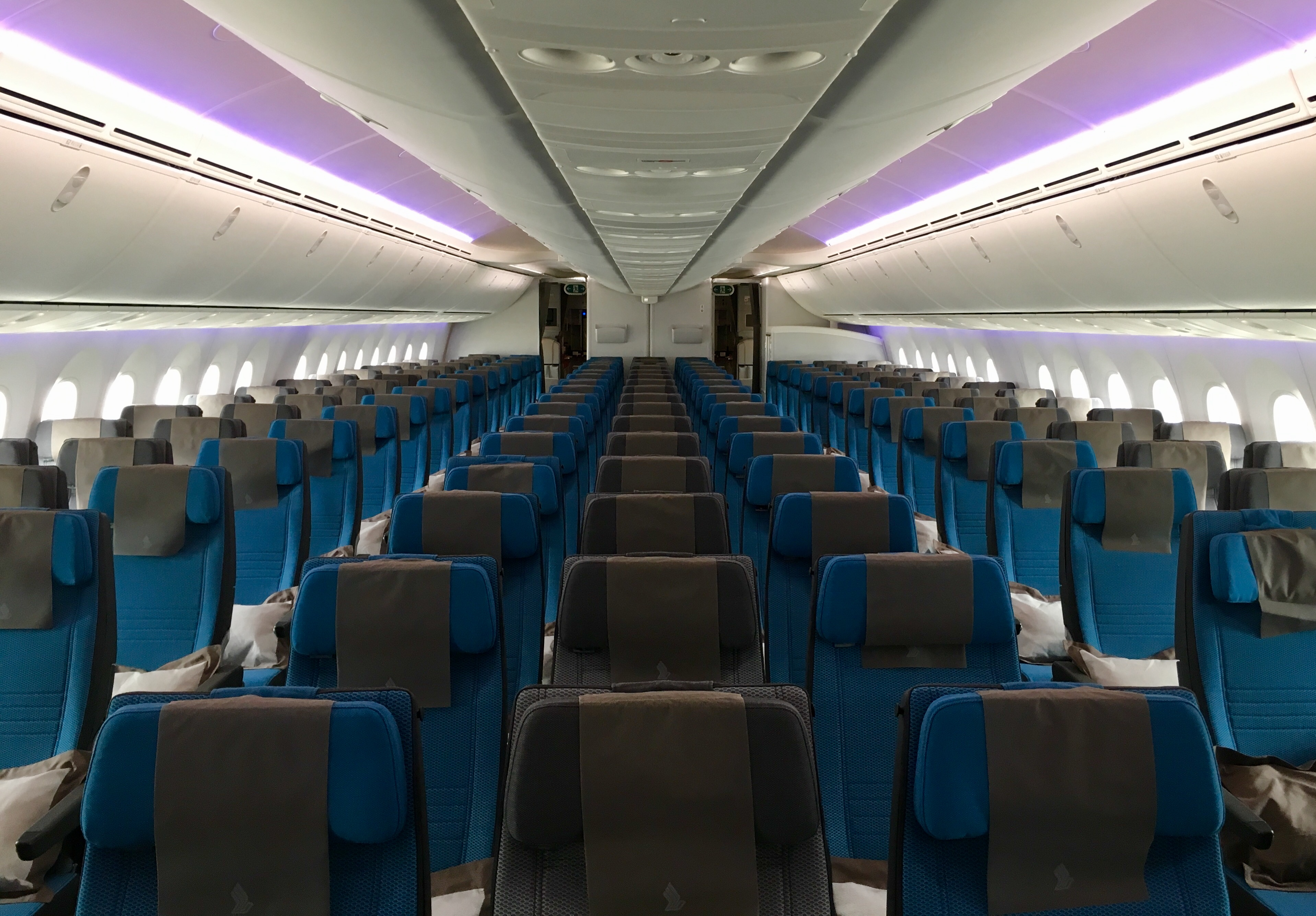 Singapore Airlines 787-10 regional economy cabin.